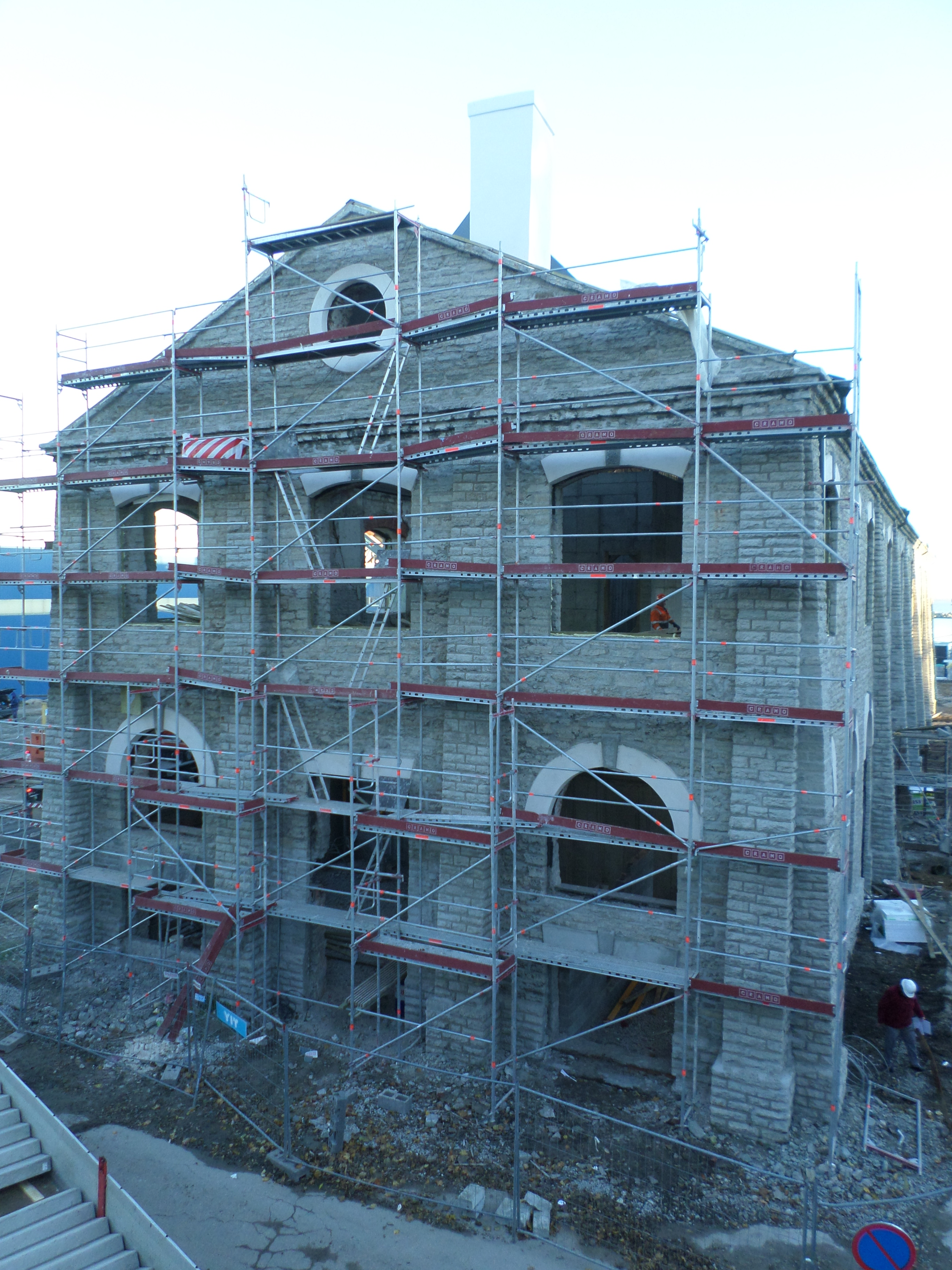 Noblessneri laevatehase ladu, 1914–1915